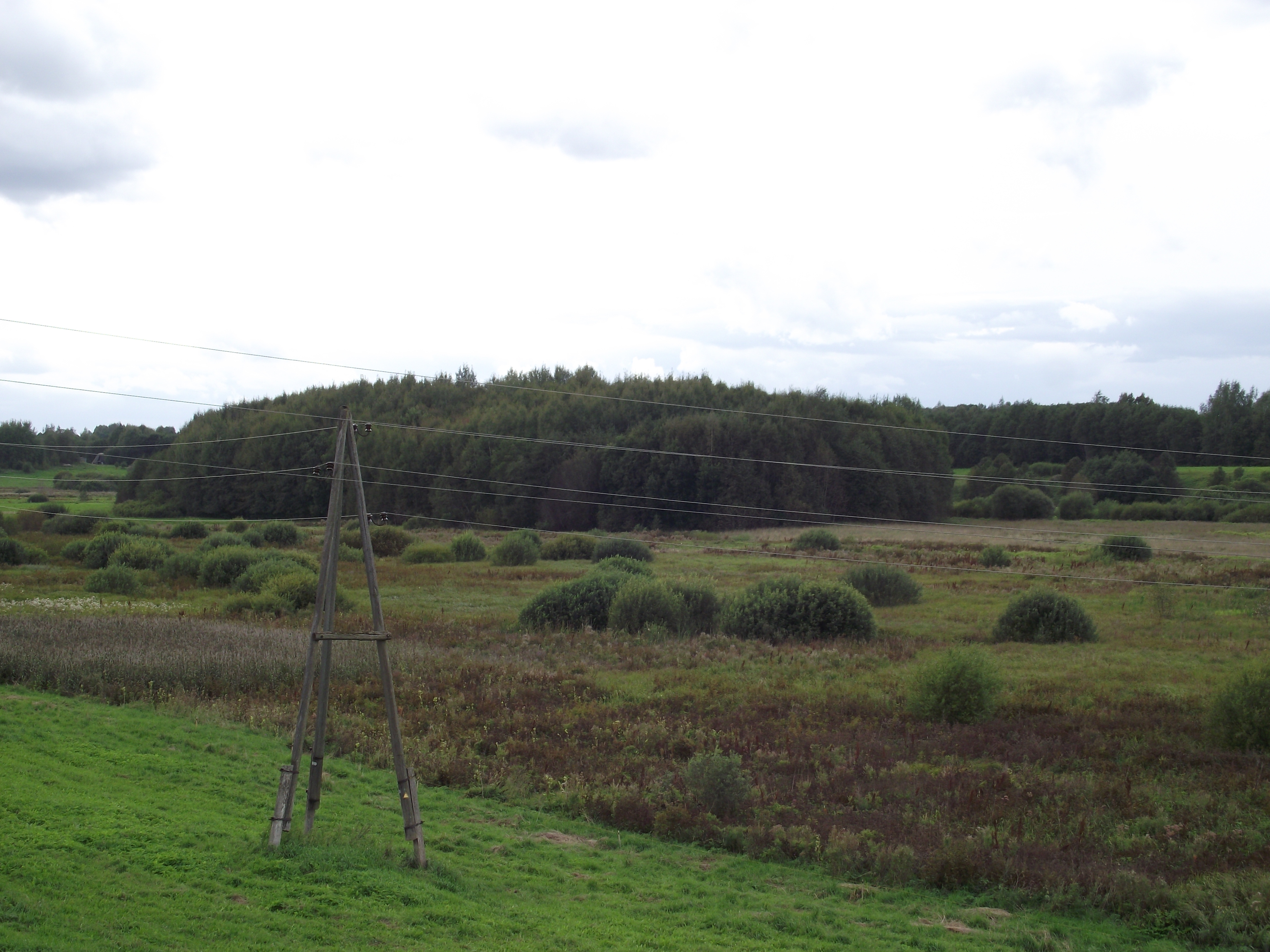 Raču Raganu kalns - kulta vieta, Rači